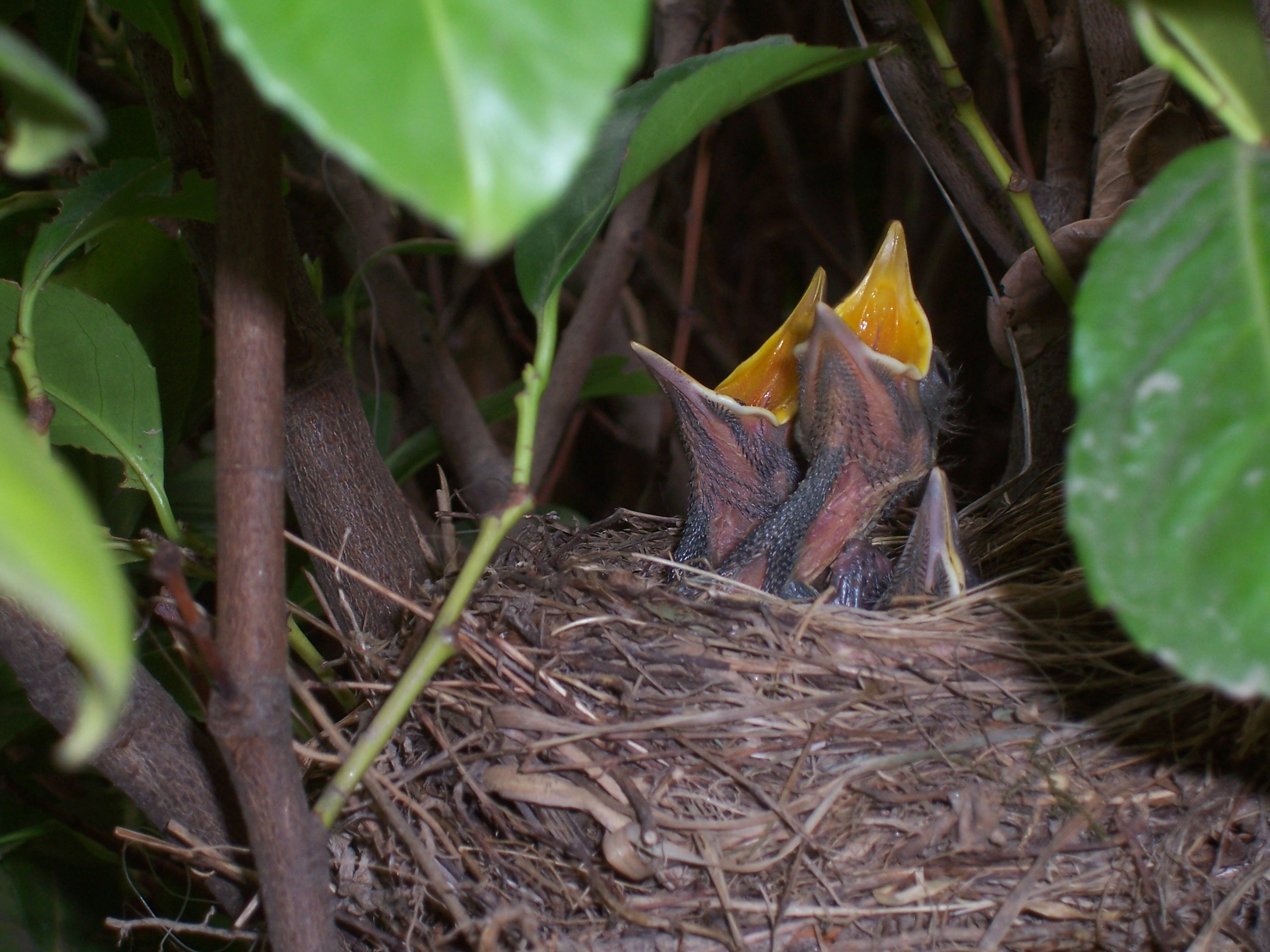 Tre pulcini di merlo (Turdus merula) in un nido. Siepe di lauroceraso in località San Paolo (Appiano sulla strada del vino)